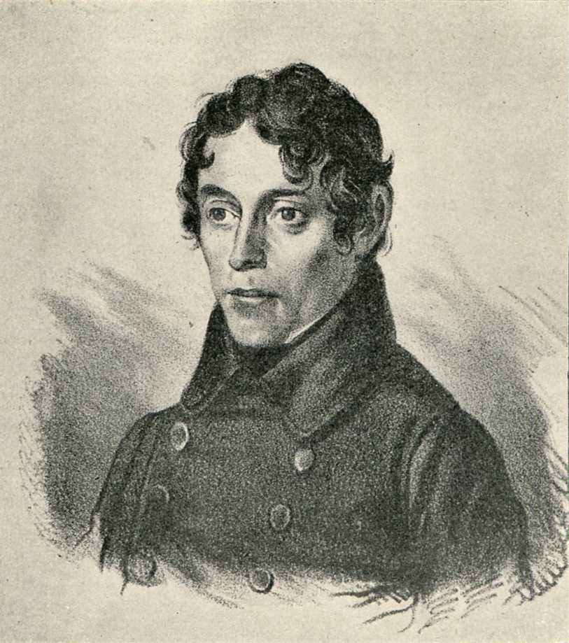 Беларуская (тарашкевіца): Партрэт Плакіда Янкоўскага (Płakid Jankoŭski)